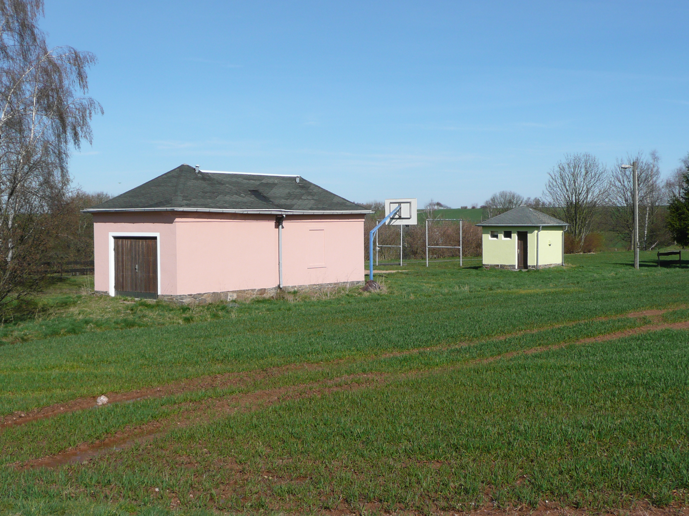 ehemalige Bahnstation Oberschaar